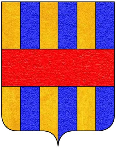 Stemma dei Trevisan detti de'Pali o dalla Dressa, di Venezia